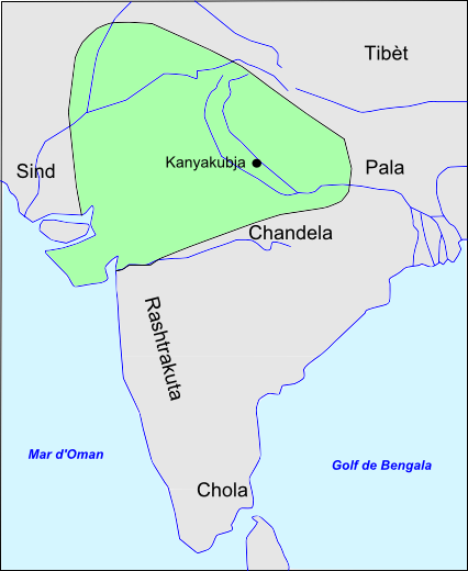 Empèri Pratihara vèrs 900.